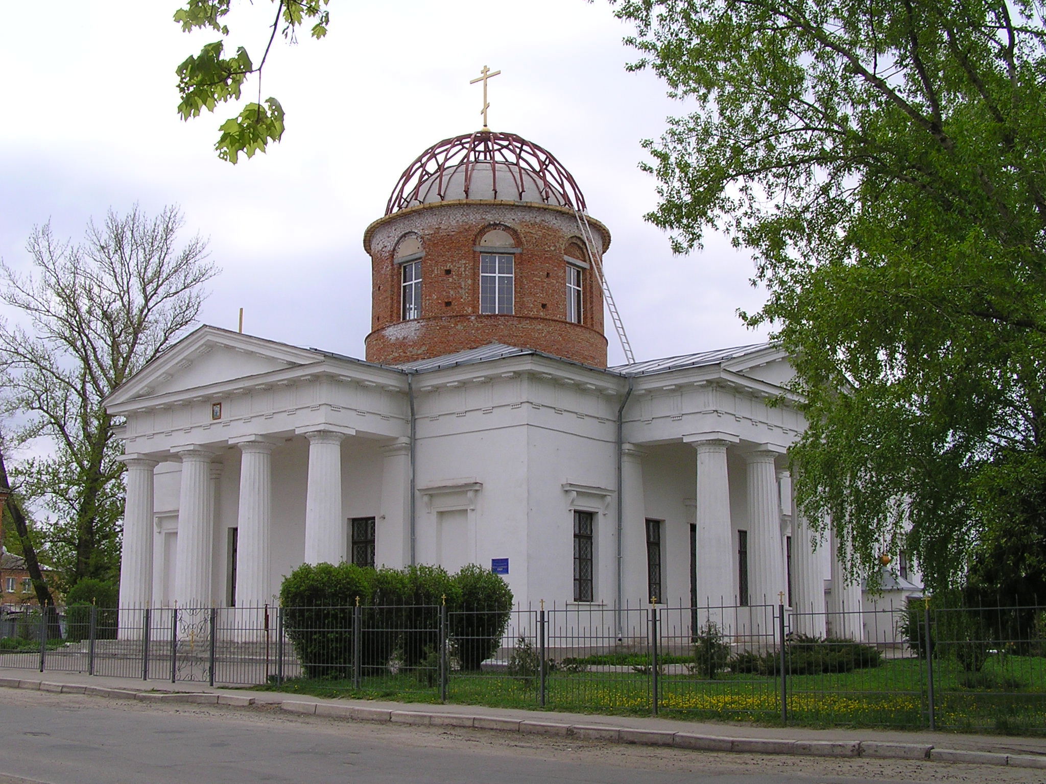 Покровський собор 1834р., м.Чугуїв